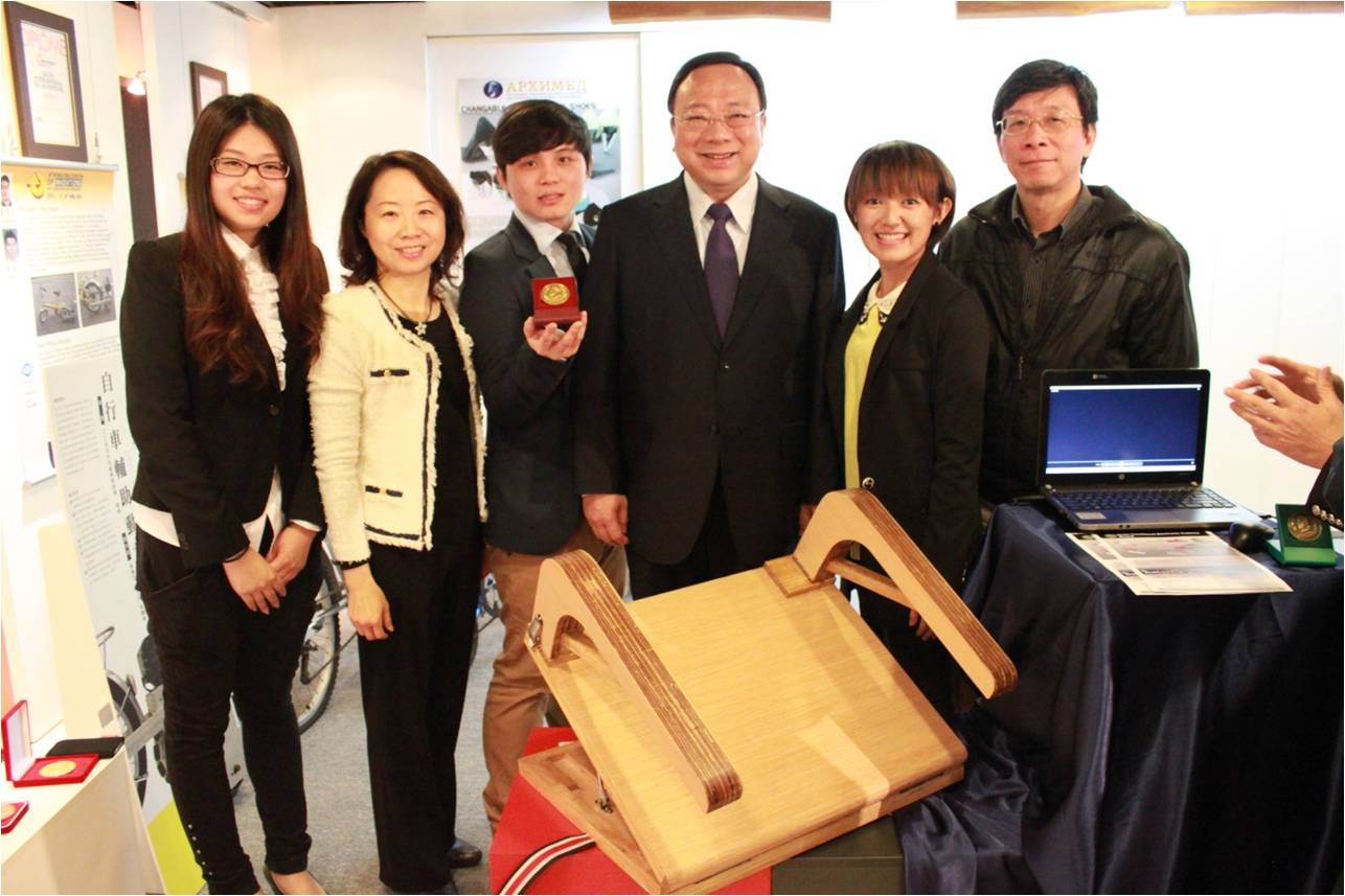 中華大學起身輔助座椅